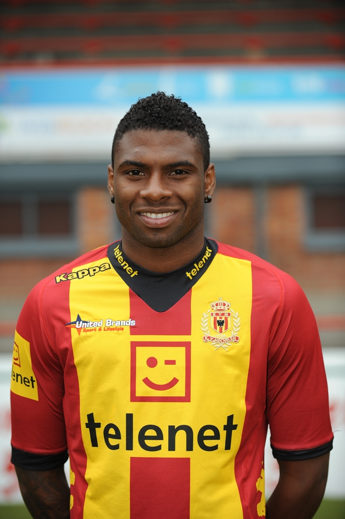 Colombiaans voetballer